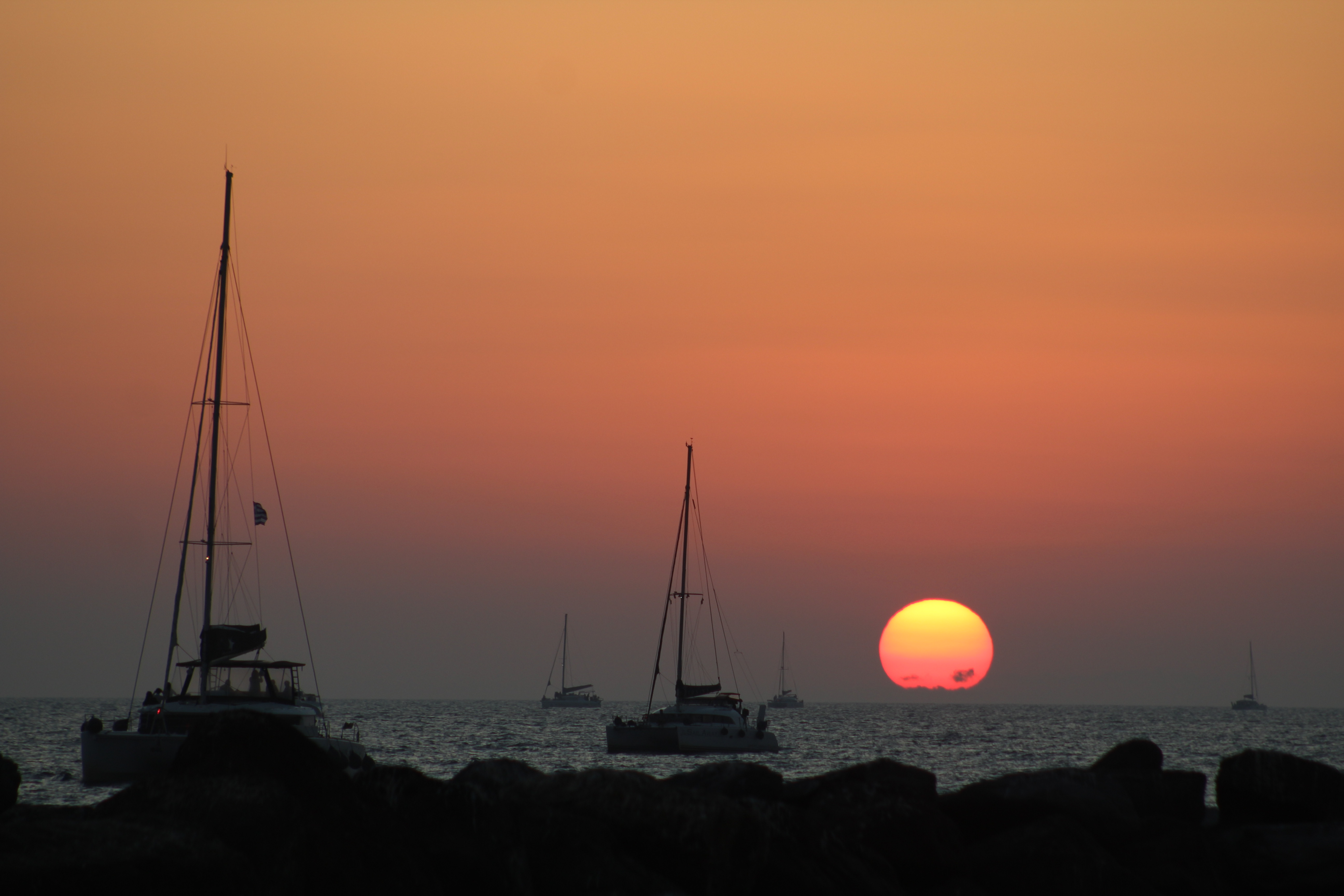 Atardecer en Vlychada, Santorini